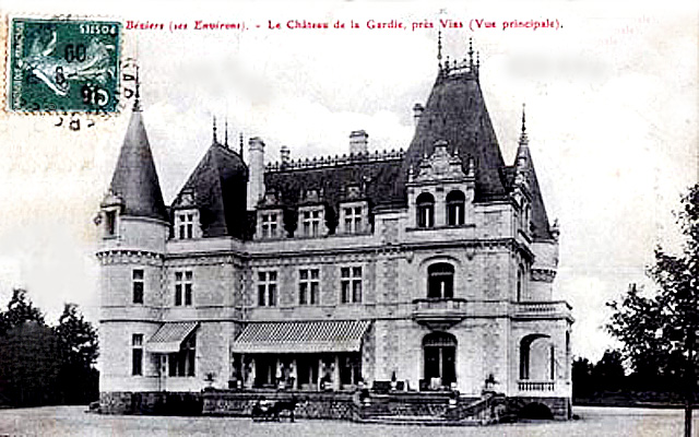 Château de la Gardie, entre Béziers et Vias, vers 1905 avant la destruction du toit lors de la Seconde Guerre mondiale.